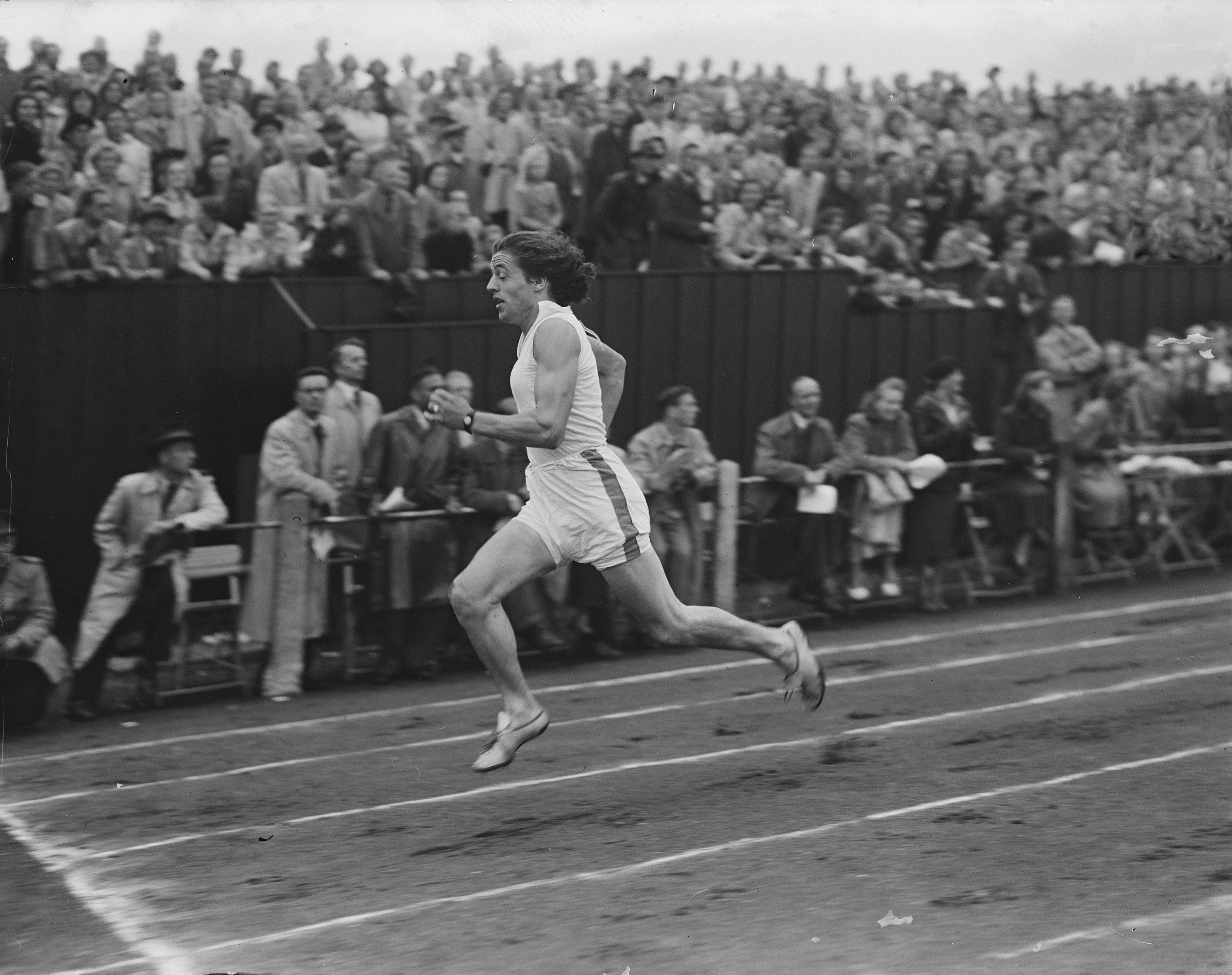 Collectie / Archief : Fotocollectie Anefo Reportage / Serie : [ onbekend ] Beschrijving : Atletiek in Groningen. Foekje Dillema Datum : 12 juli 1950 Locatie : Groningen, Groningen (stad) Trefwoorden : atleten, atletiek Persoonsnaam : Dillema, Foekje Fotograaf : Noske, J.D. / Anefo Auteursrechthebbende : Nationaal Archief Materiaalsoort : Glasnegatief Nummer archiefinventaris : bekijk toegang 2.24.01.09 Bestanddeelnummer : 904-0733